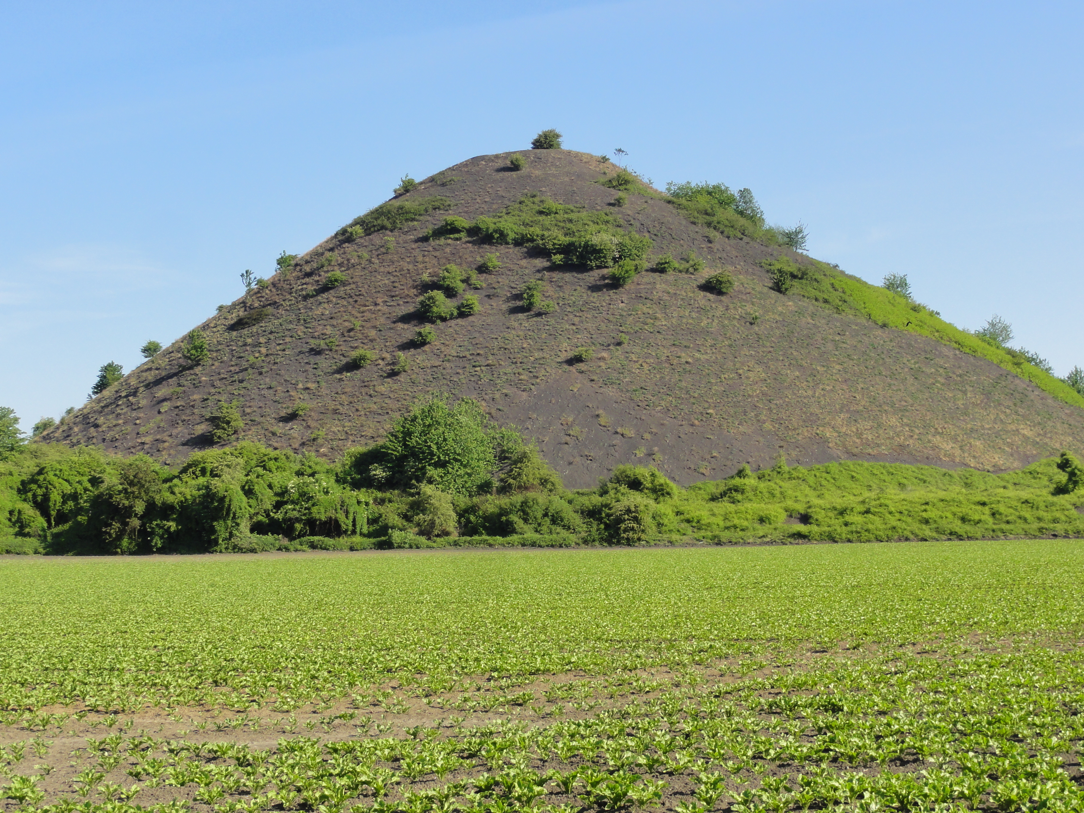 Terril n° 153 dit Audiffret Sud, Fosse Audiffret Pasquier de la Compagnie des mines d'Anzin, Escaudain, Nord, Nord-Pas-de-Calais, France.